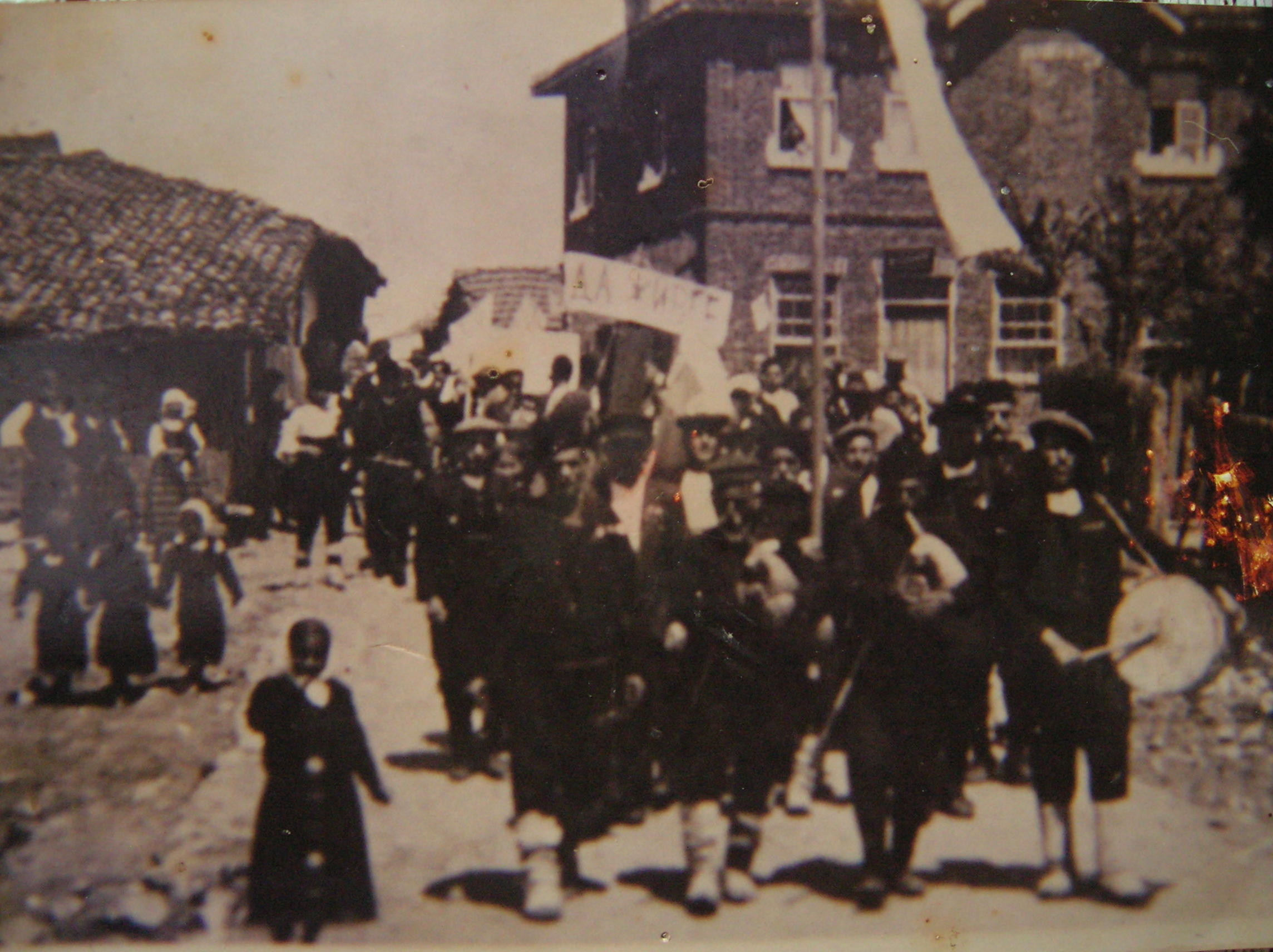 Първомайска манифестация в Желязково (днес Момина църква) 1952 г.